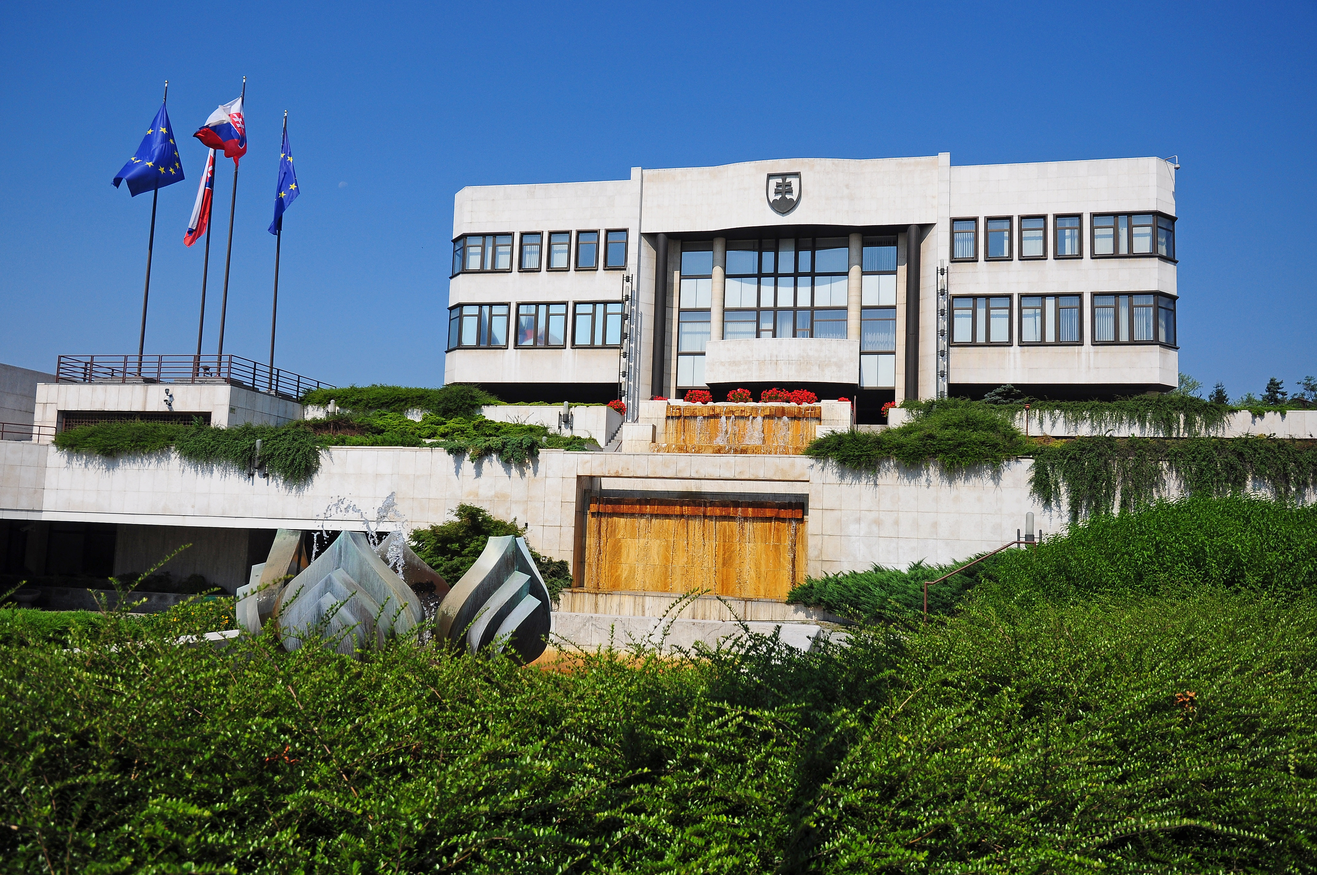 Bratislava, Parlament, Slovensko